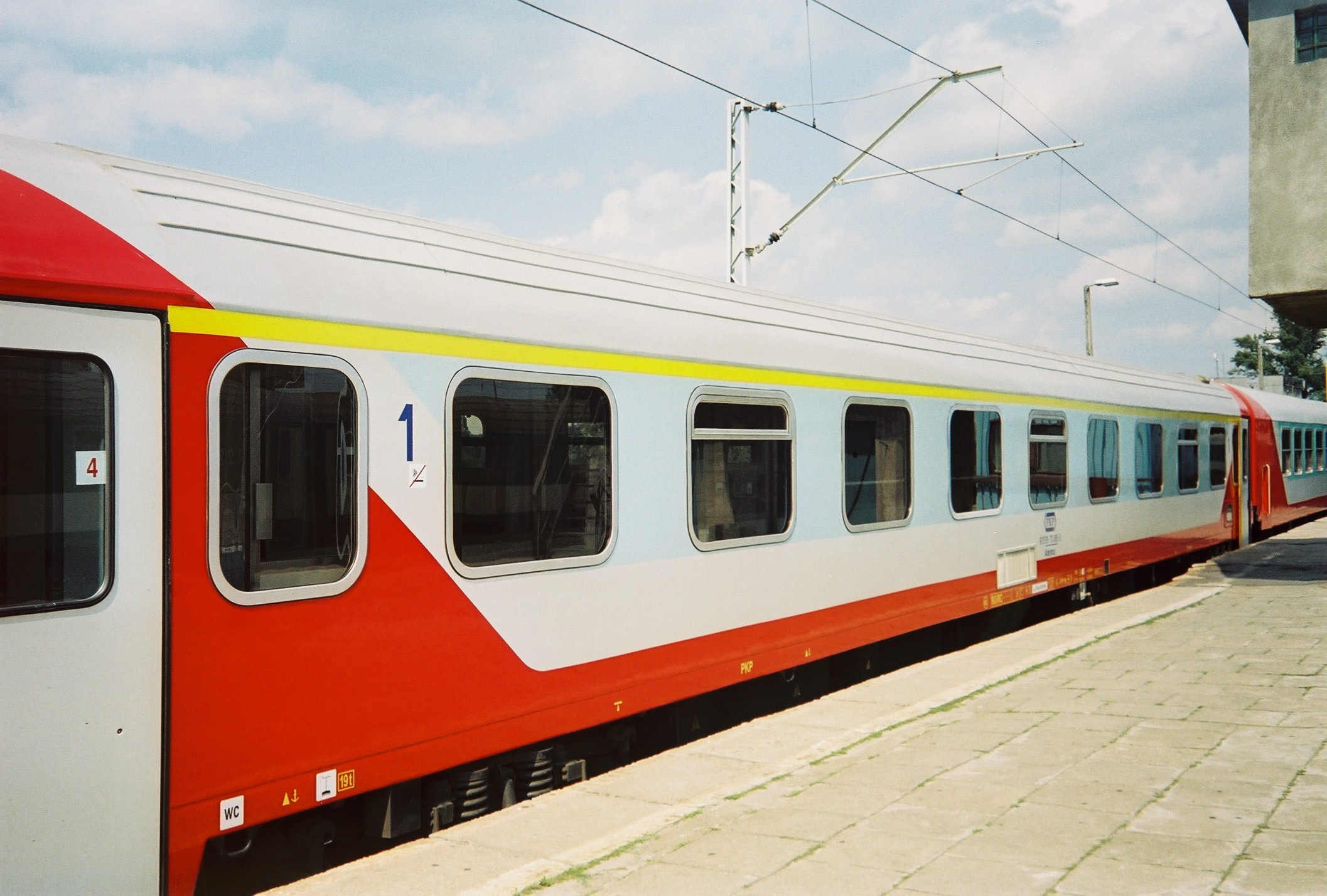 Klimatyzowany wagon Ademnu typu 145Ab z przedziałami menadżerskimi w składzie pociągu InterCity Krakus w Warszawie Wschodniej.